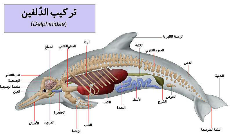 تشريح الدلفين